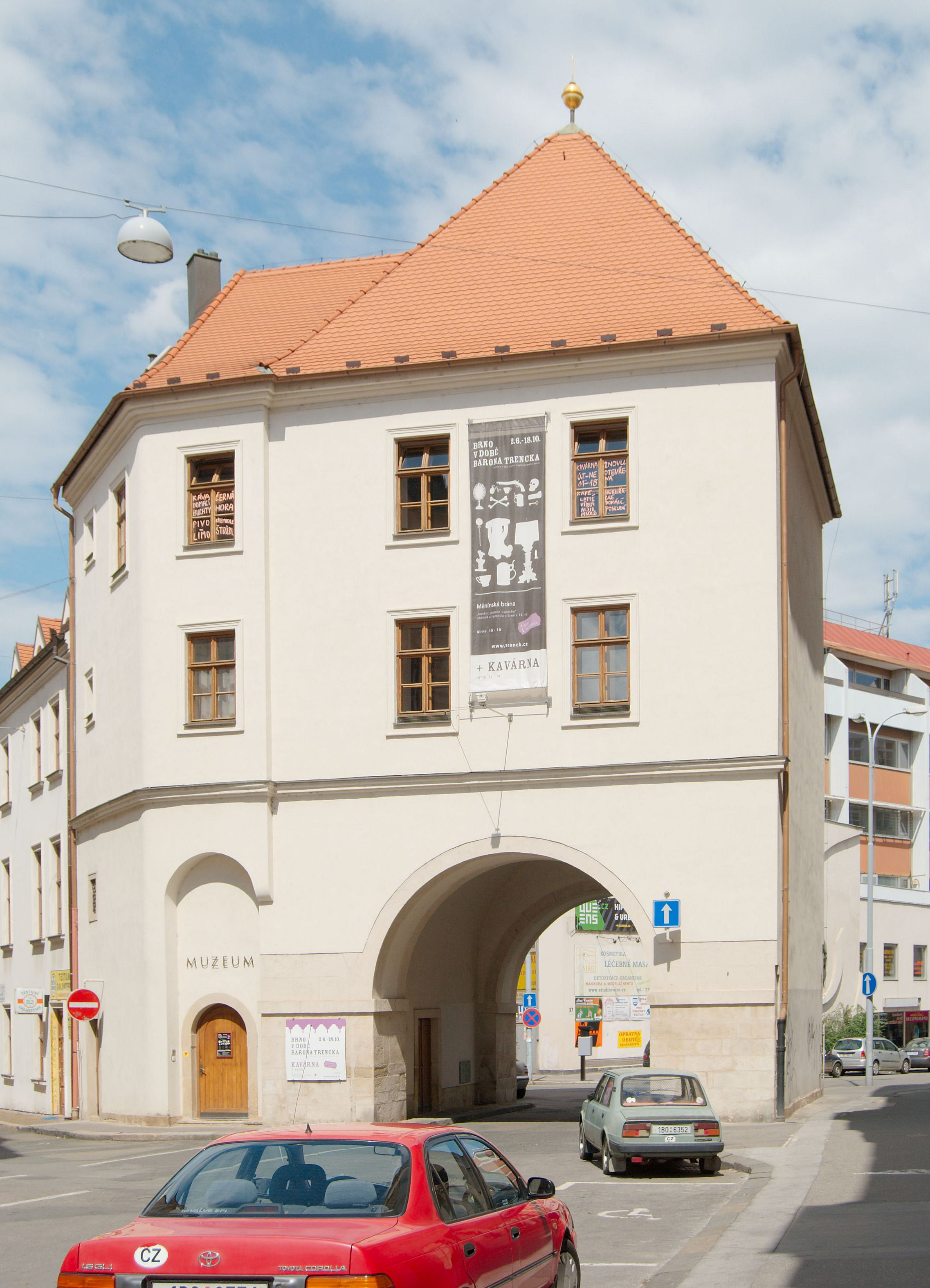 Město Brno - Měnínská brána